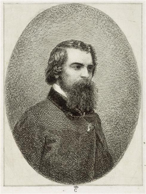 Self-portrait